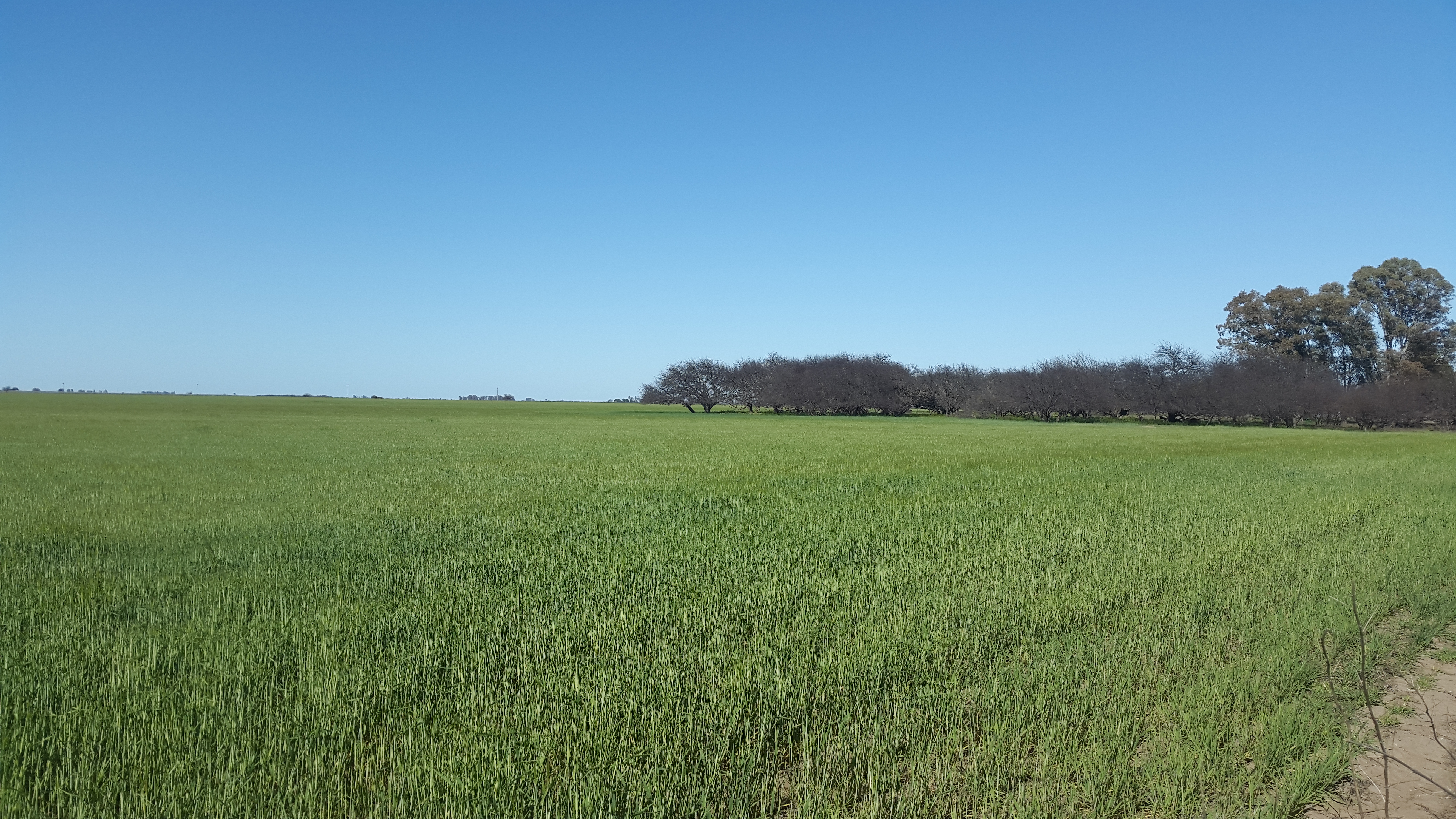 Zona agropecuaria,campo sembrado